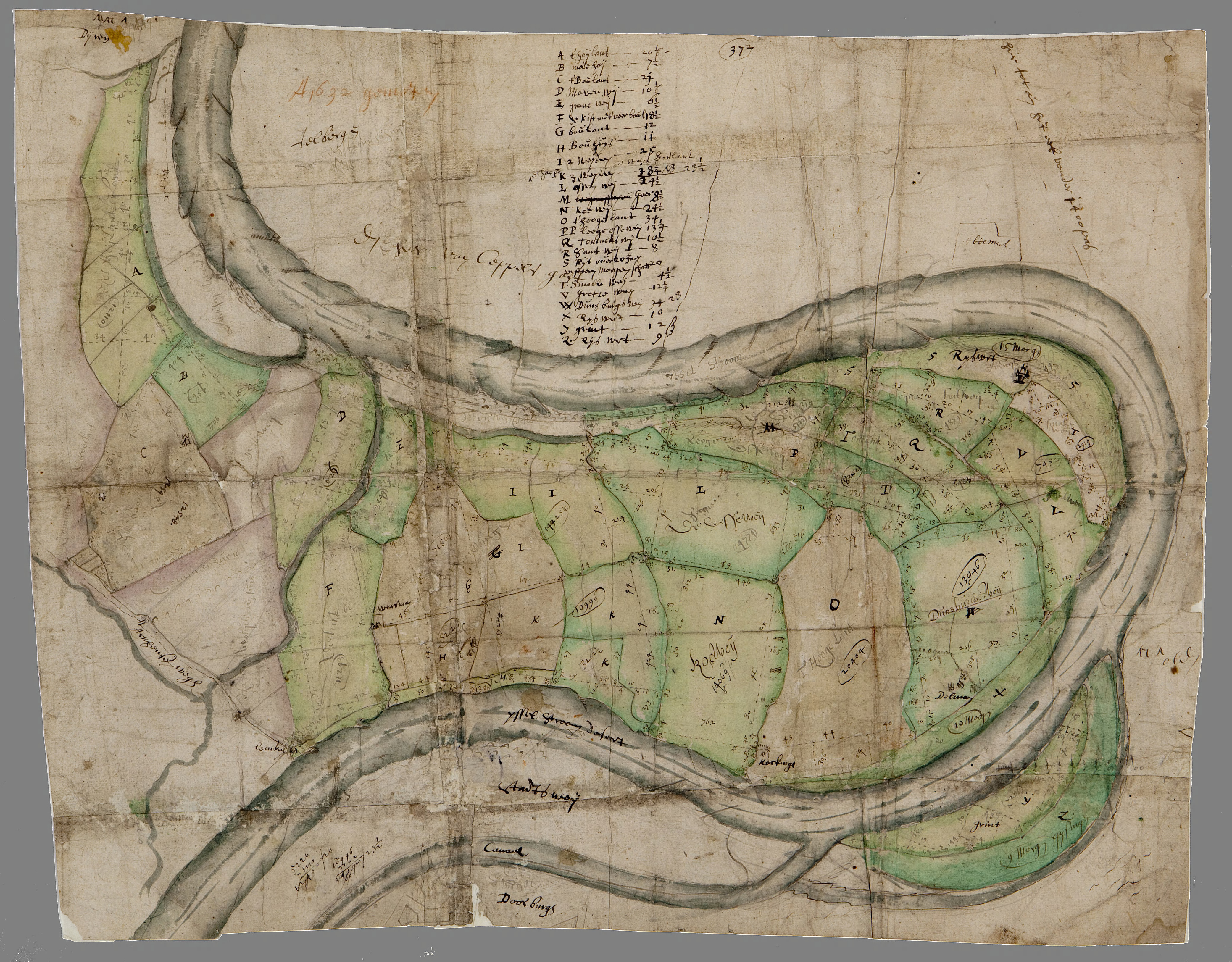 Kaart van de Fraterwaard ten noorden van Doesburg